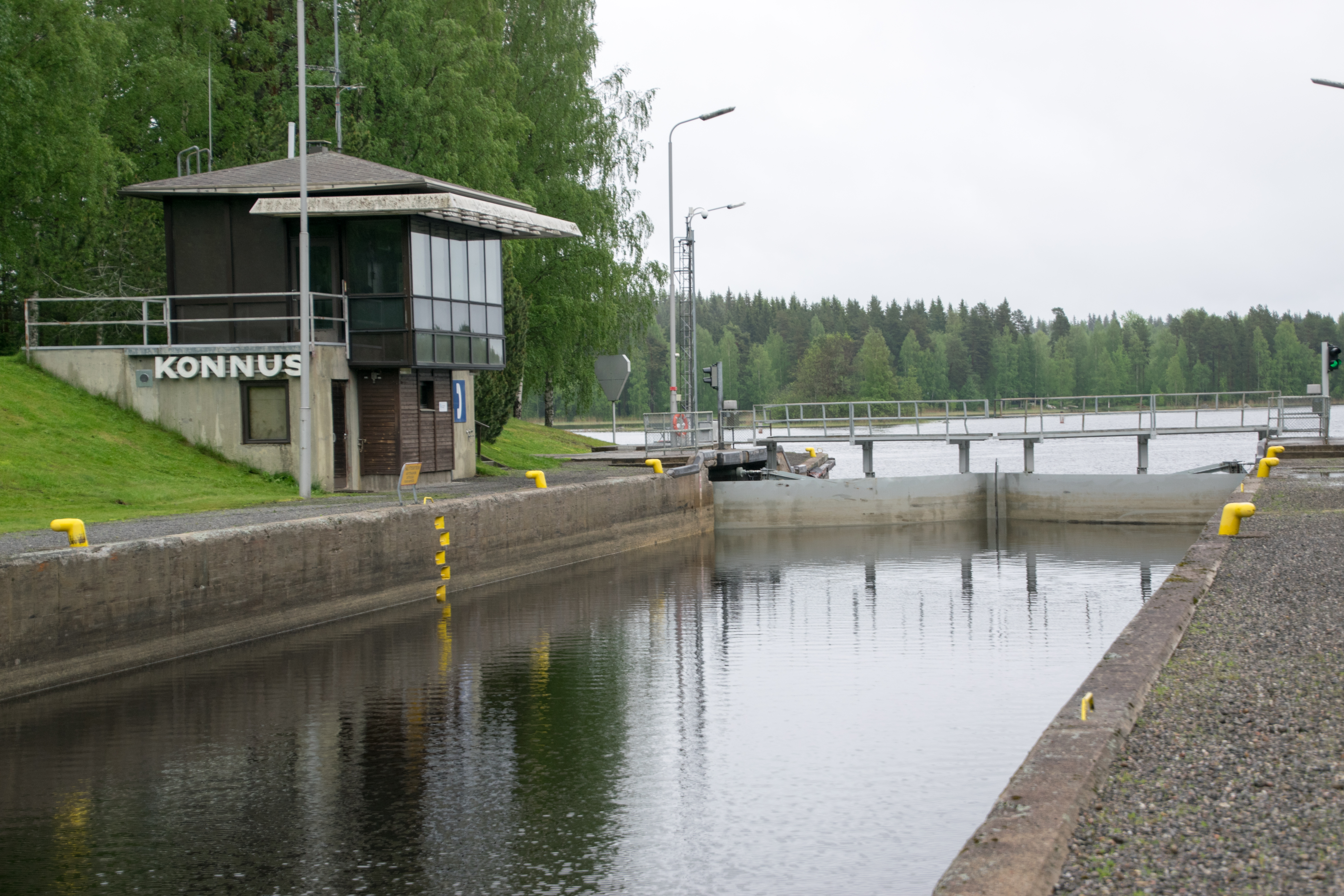 Konnuksen kanava